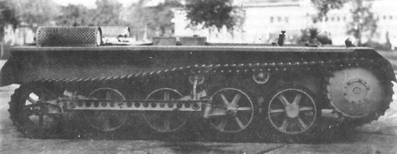 First prototype of Kleintraktor (Panzerkampfwagen I)